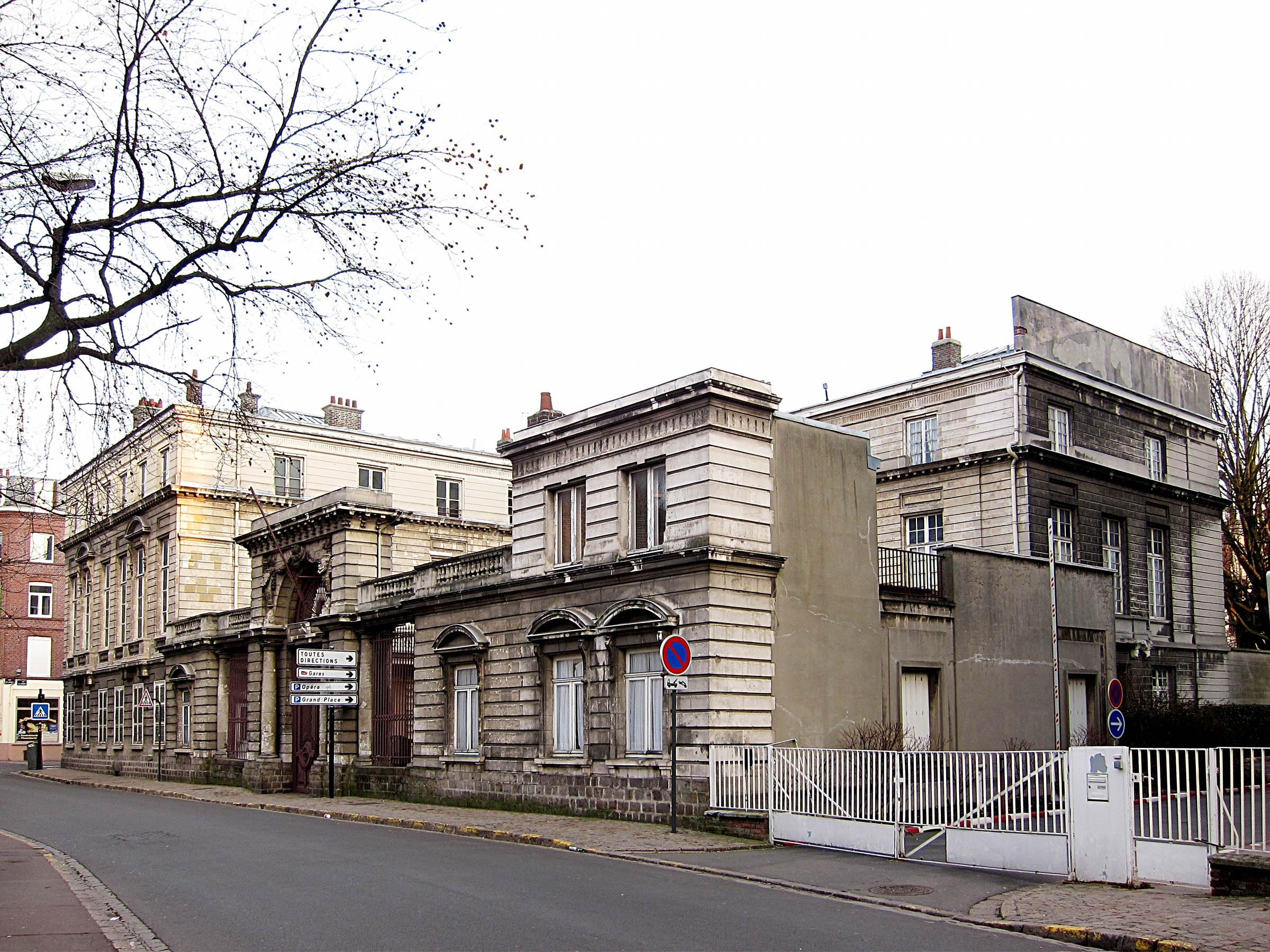 Hôtel d'Avelin (Hôtel du Rectorat), 22 rue Saint-Jacques à Lille.